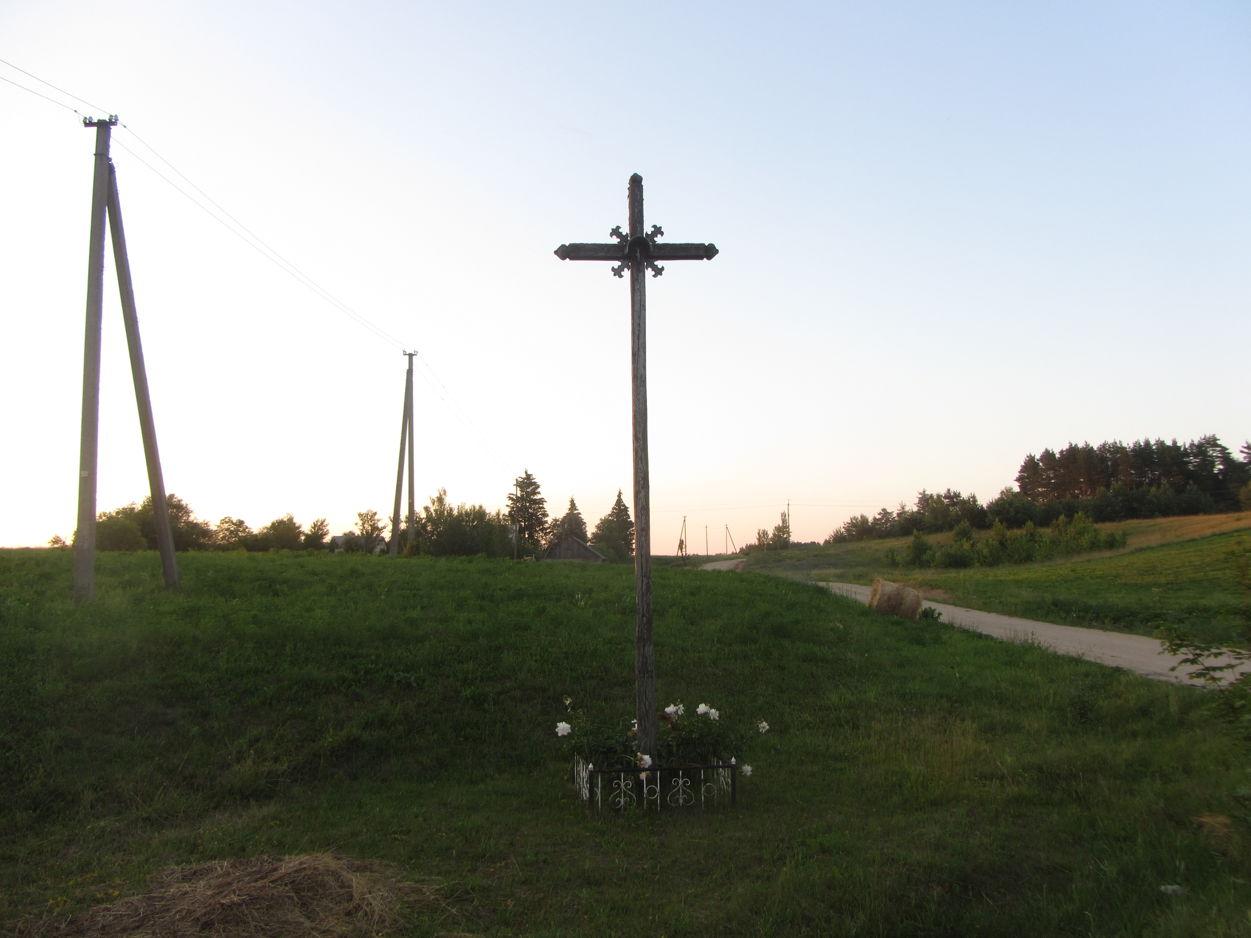 Lapšius 67229, Lithuania